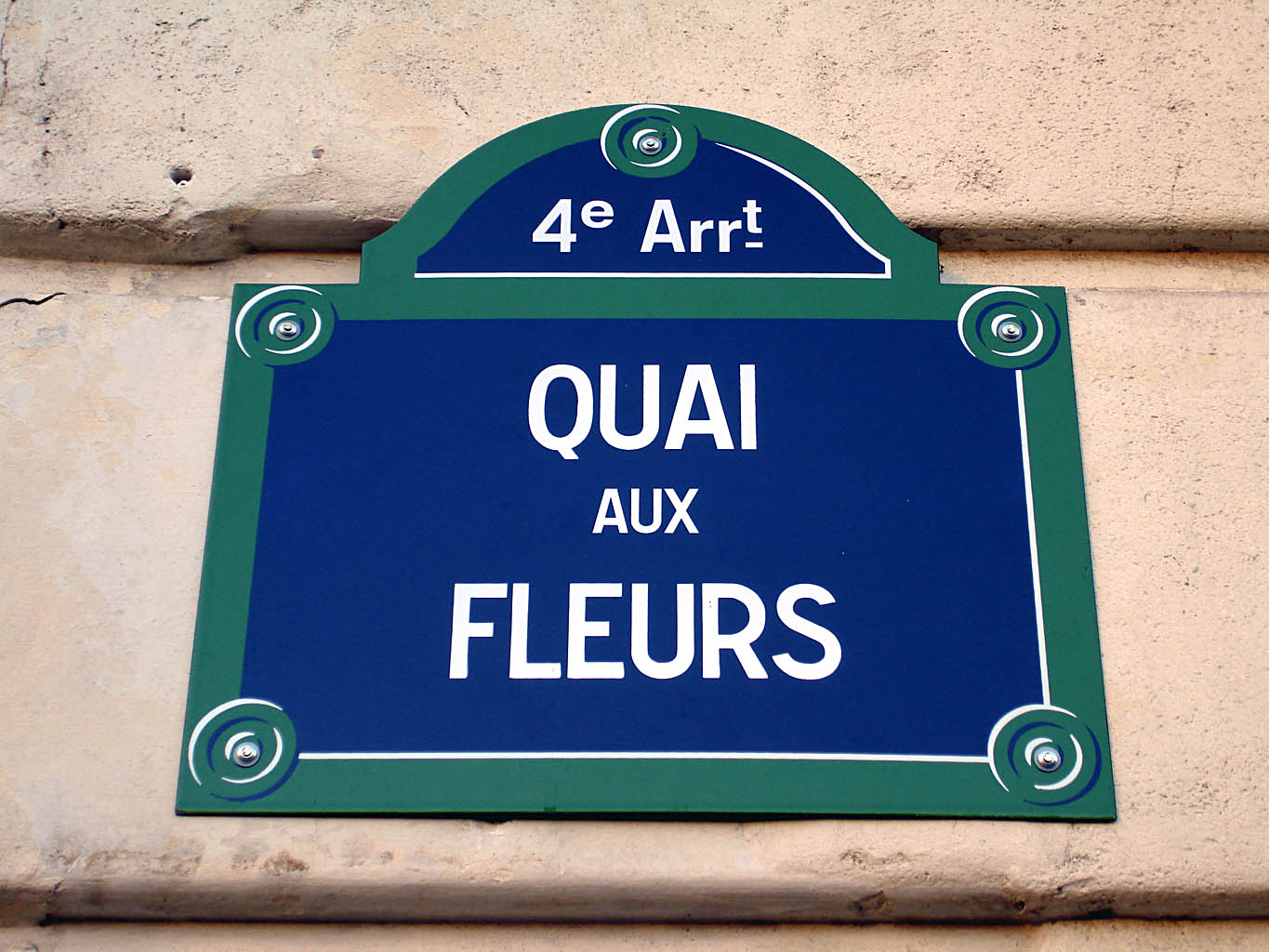 Plaque du quai aux Fleurs, Paris (France)